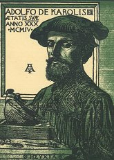 Self-portrait